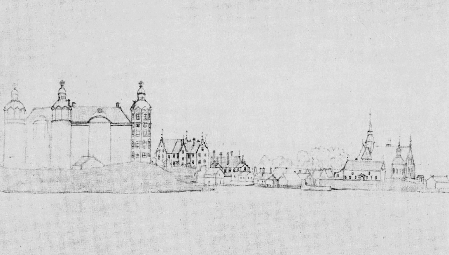 Nya slottet, gamla gården med trappstegsgavlar och klosterkyrkan, teckning av Erik Dahlberg 1666